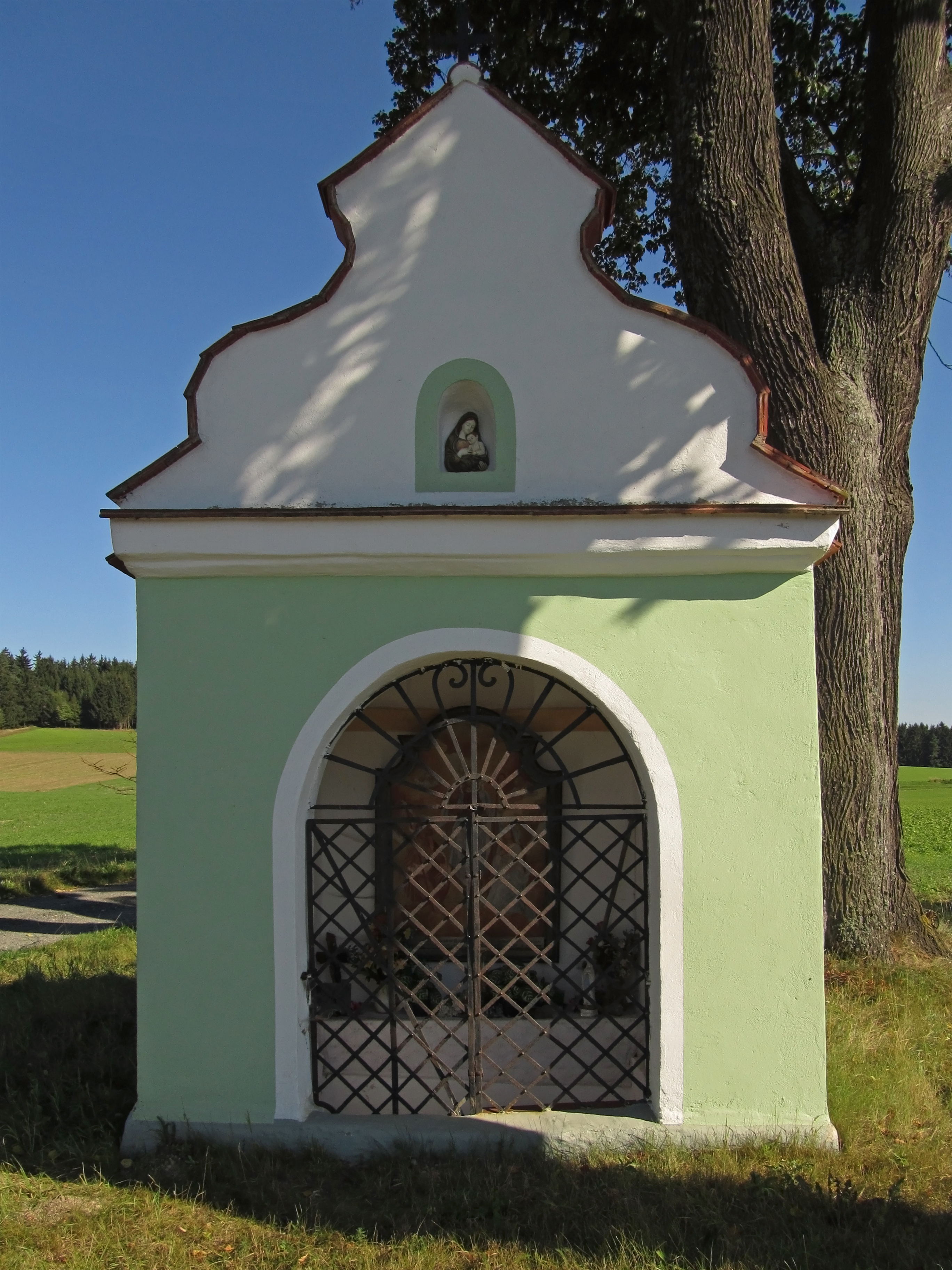 Die nachbarocke, wahrscheinlich in der ersten Hälfte des 19. Jahrhunderts errichtete Wegkapelle am östlichen Ortsende hat eine Putzgliederung und einen geschwungenen Giebel.